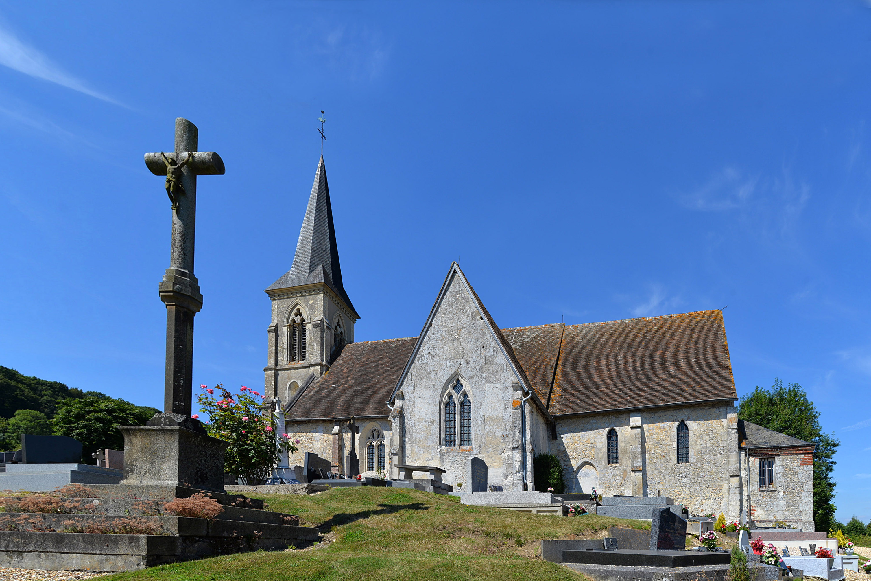 Pierrefitte-en-Auge (Calvados)